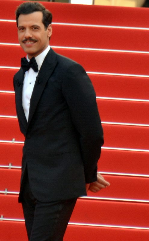 Laurent Lafitte au festival de Cannes